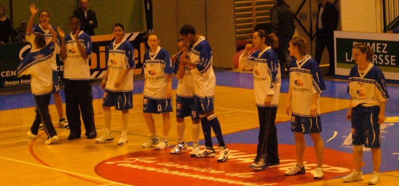 L'équipe de Ligue féminine de basketball de l'Union Saint Amand Porte du Hainaut en mars 2007 à Clermont-Ferrand. French women basketball team of Saint-Amand Porte du Hainaut in march 2007 in Clermont-Ferrand